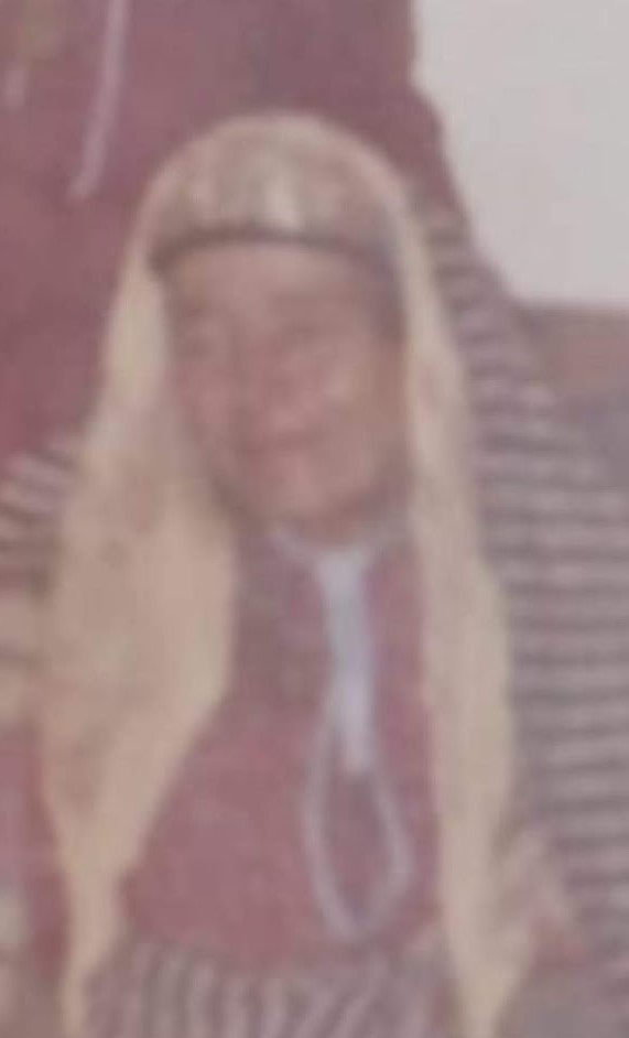 התמונה היחידה שנותרה לנו מסבתא שוישנה ז"ל